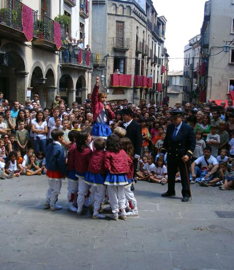 Ball de Bastons de Solsona fent el ballet de la Catitomba durant la Festa Major de 2008.